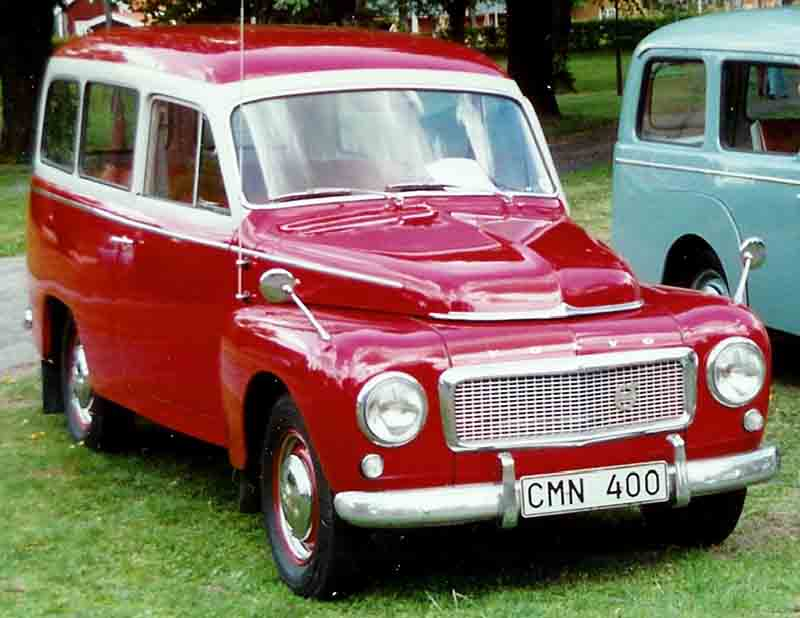 Volvo 21134 A Duett 1960